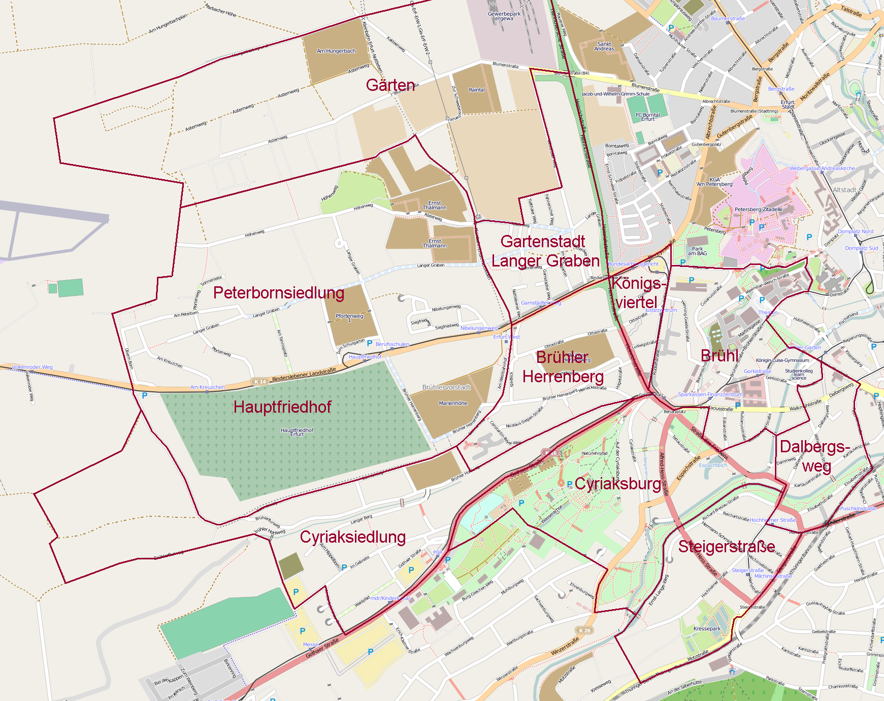 Eine Karte der Viertel im Stadtteil Brühlervorstadt von Erfurt.